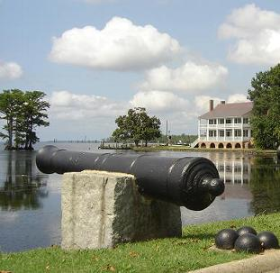 Taken by Kevin Mills